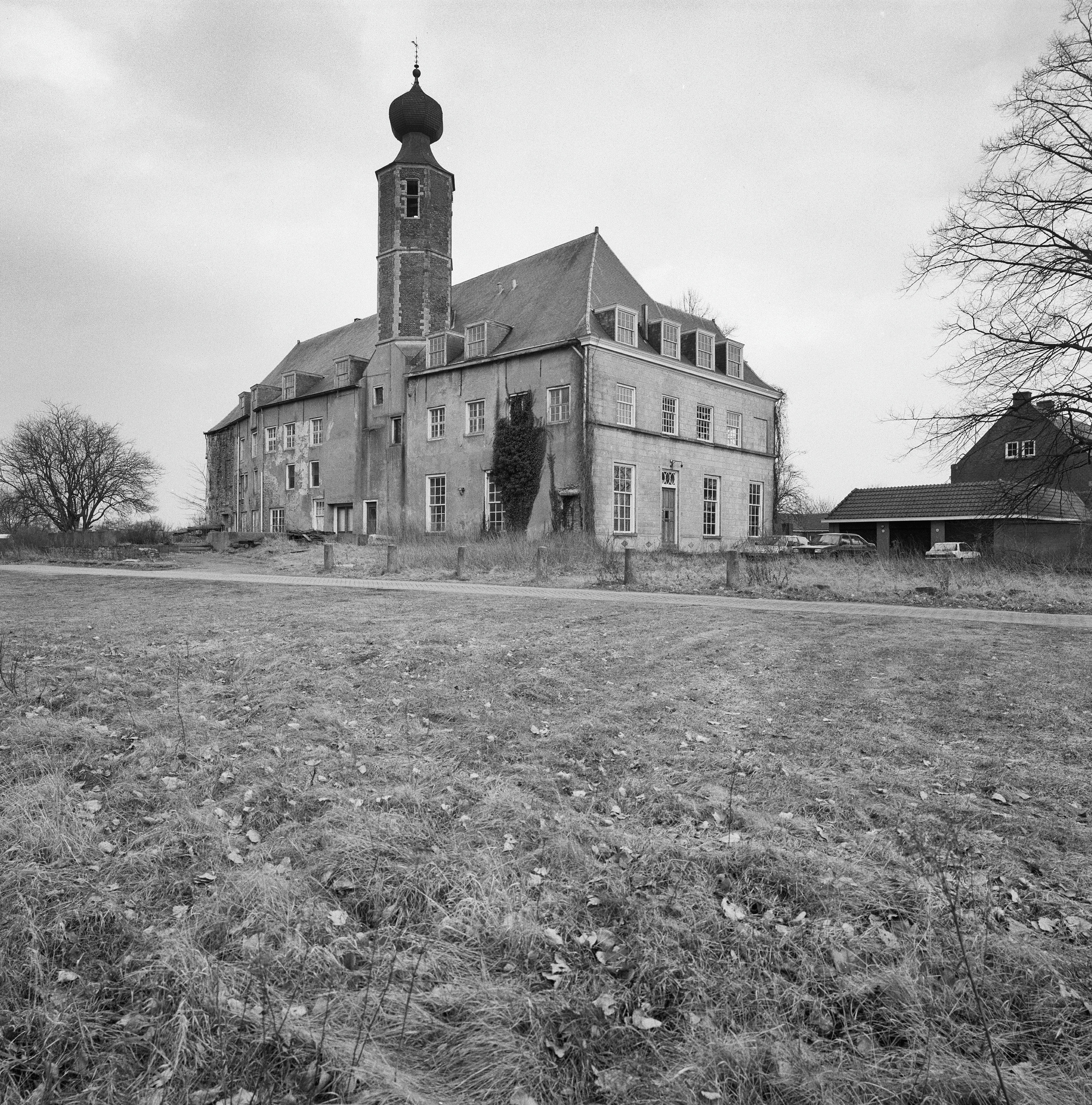 Voormalig Kasteel Nieuw Herlaer: Overzicht voorgevel met traptoren en rechter zijgevel (opmerking: Gefotografeerd voor Monumenten In Nederland Noord-Brabant, bladzijde 294)